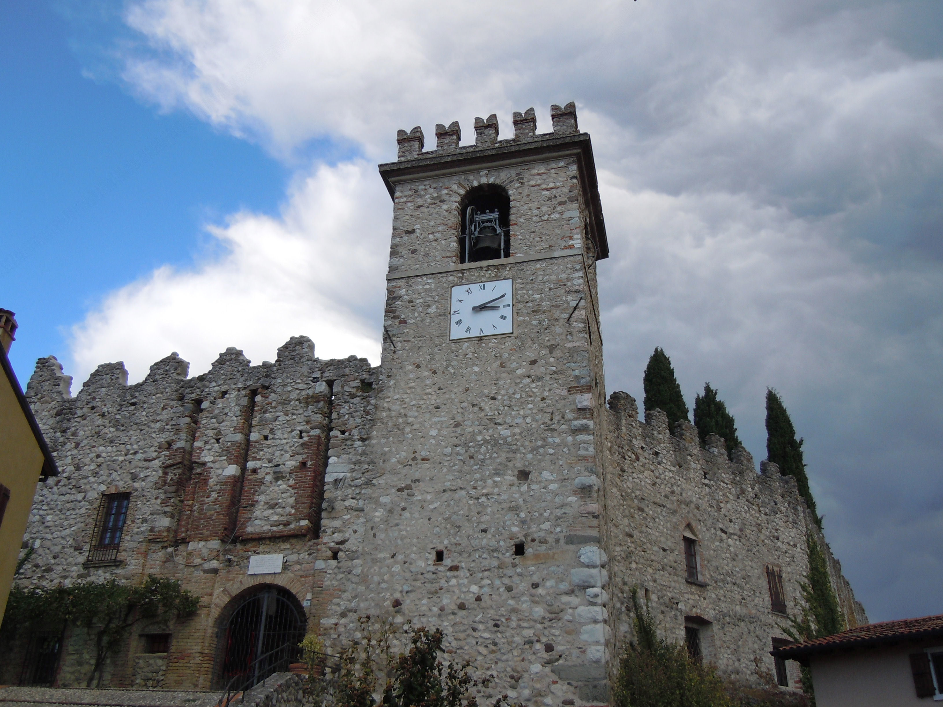 Soiano del Lago, il castello.